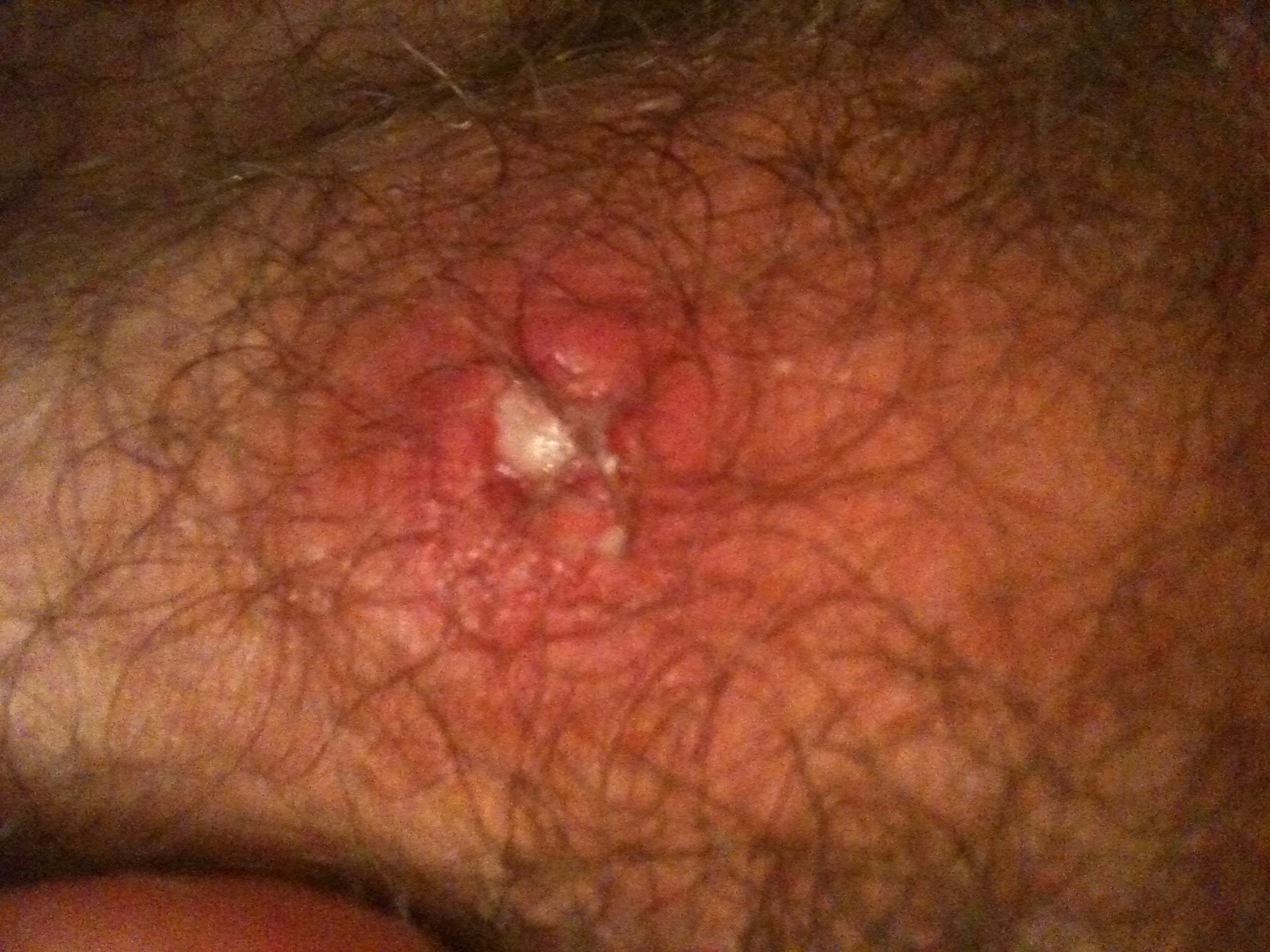 Evolution d'un furoncle : J+4